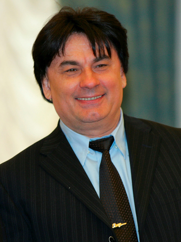 Церемония вручения государственных наград. Почетное звание «Народный артист России» присвоено Александру Серову.